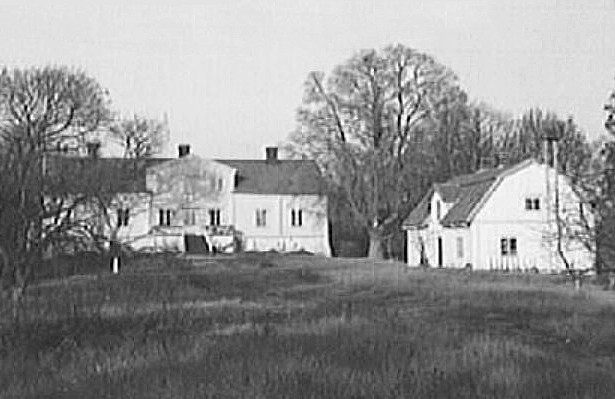 Närlunda säteri vid Gnesta